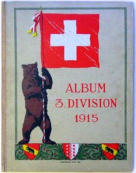 Album 3. Division 1915. Grenzbesetzung, Berner Division, Schweiz